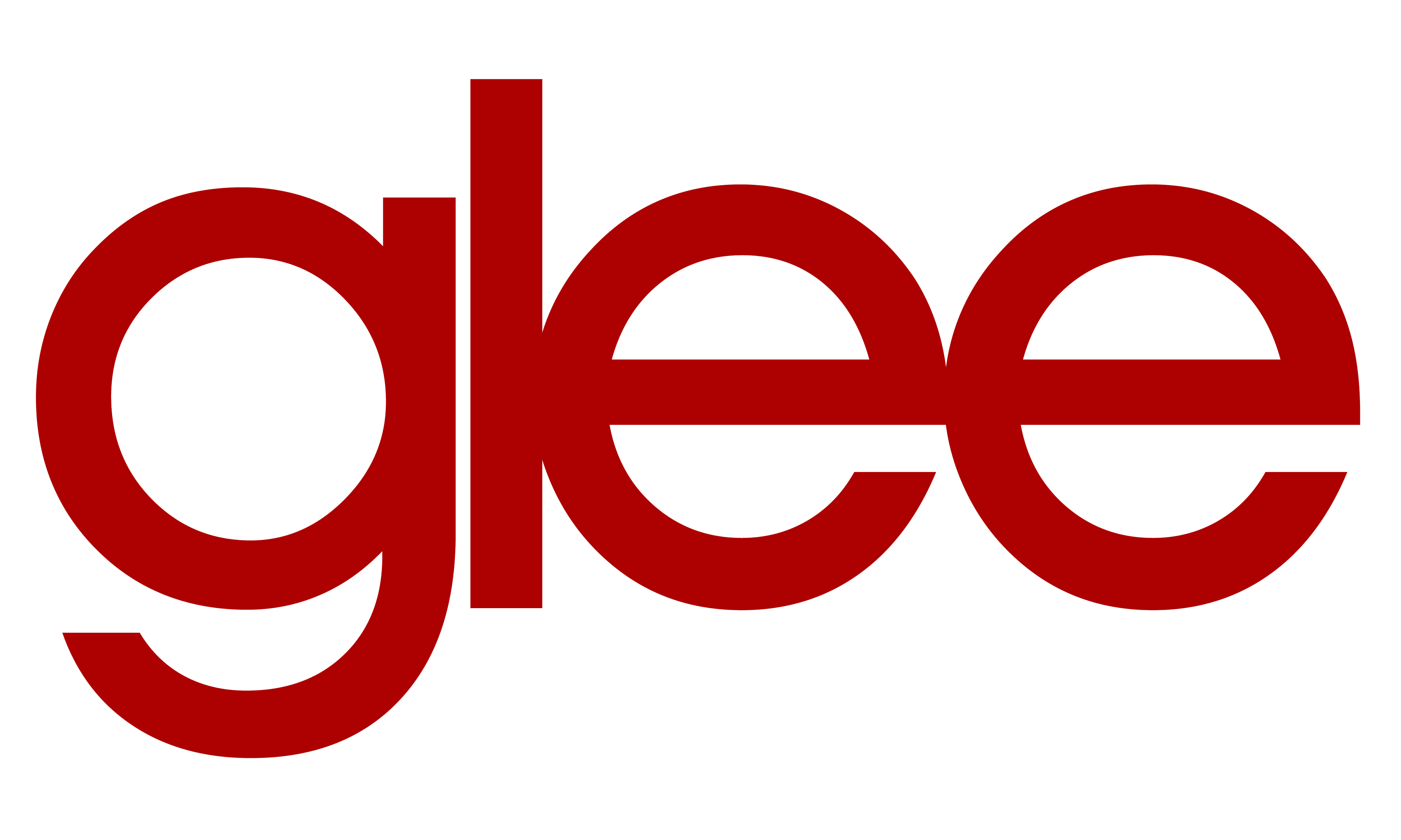 Logo de serie glee